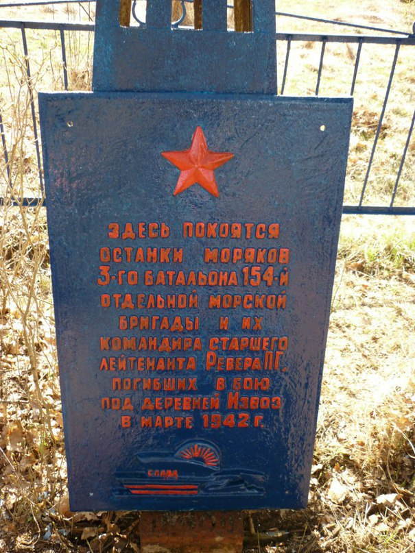 село Извоз